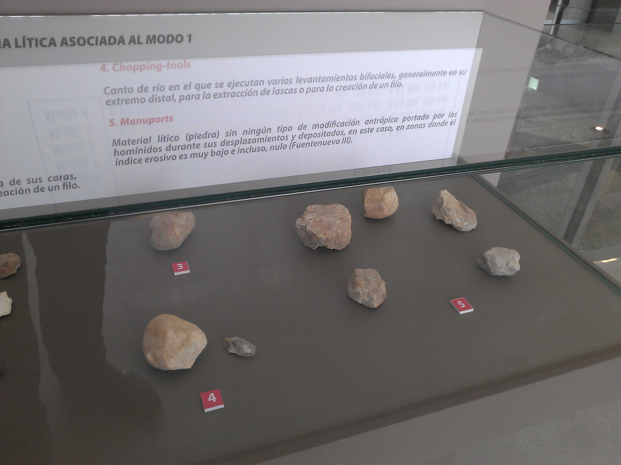 Herramientas de piedra encntradas en el yacimiento Fuentenueva III. Museo de Prehistoria de Orce, Granada (España)